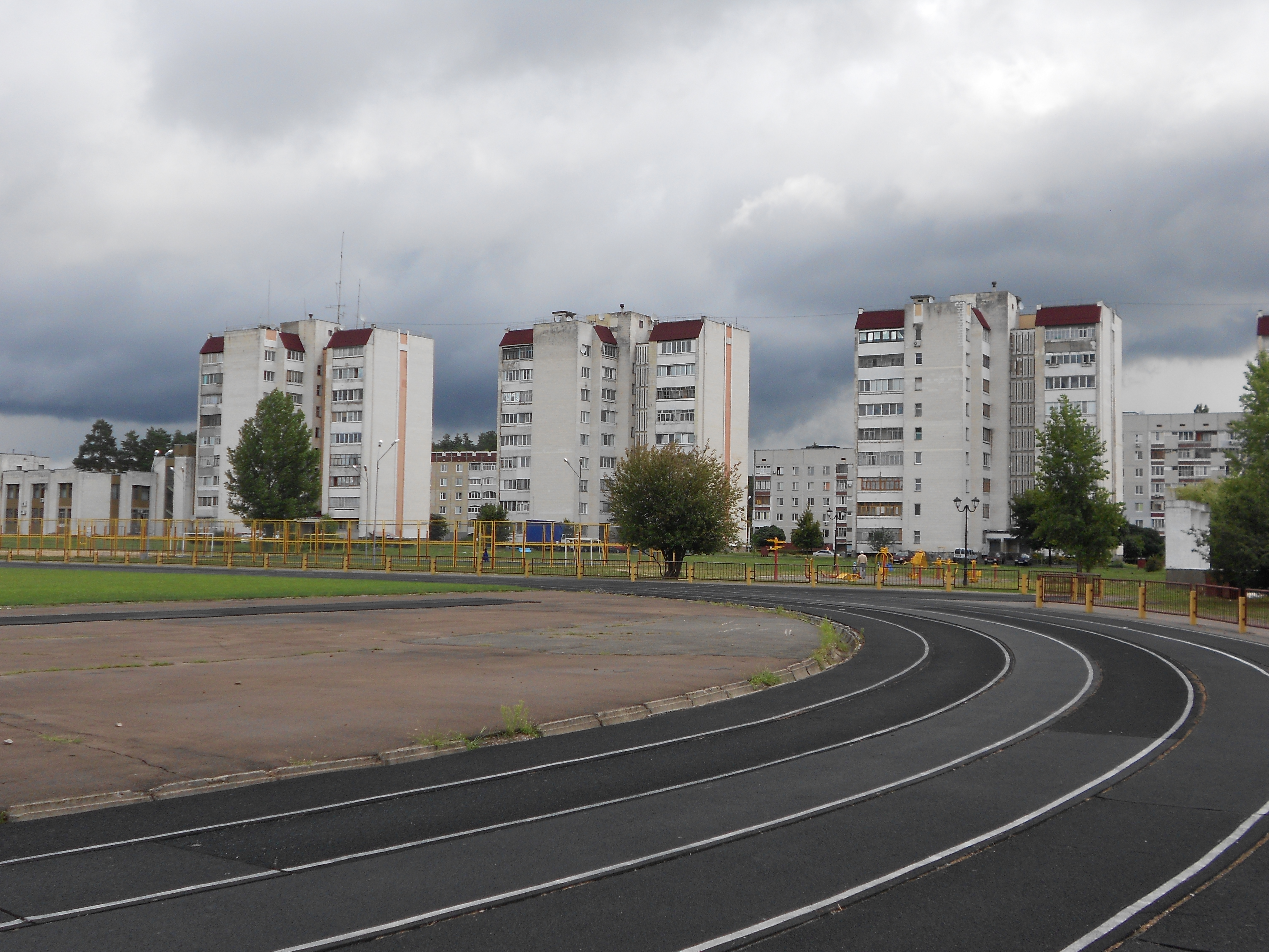 Стадіон у Славутиче